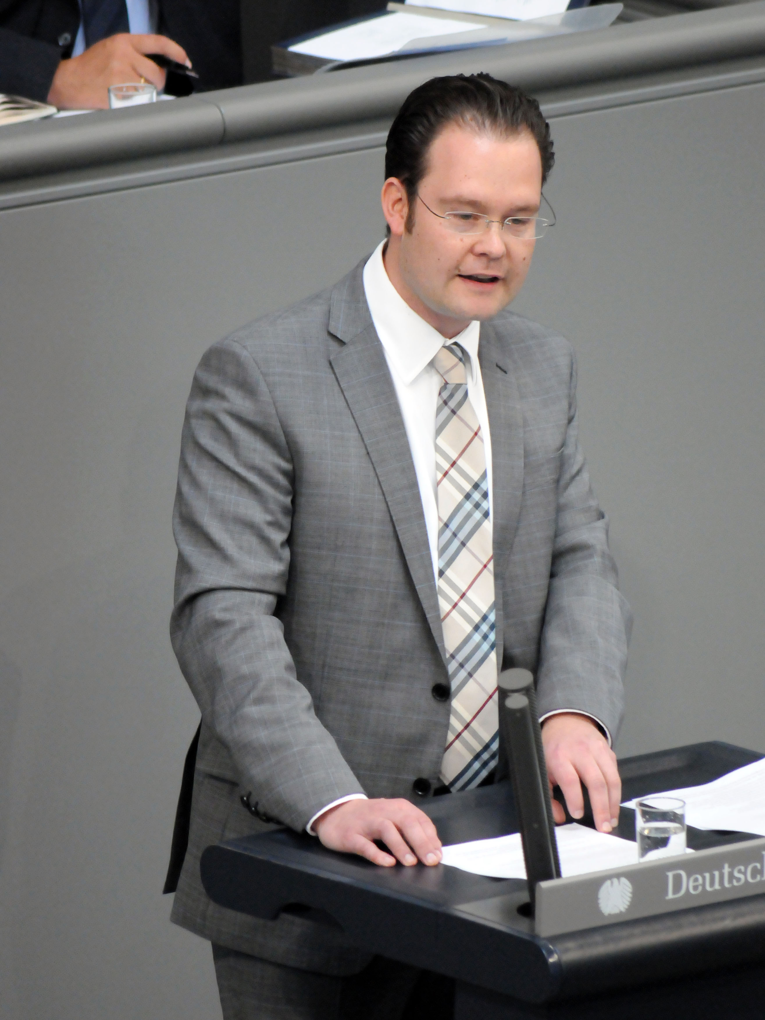 Tankred Schipanski, MdB, bei Red im Bundestag